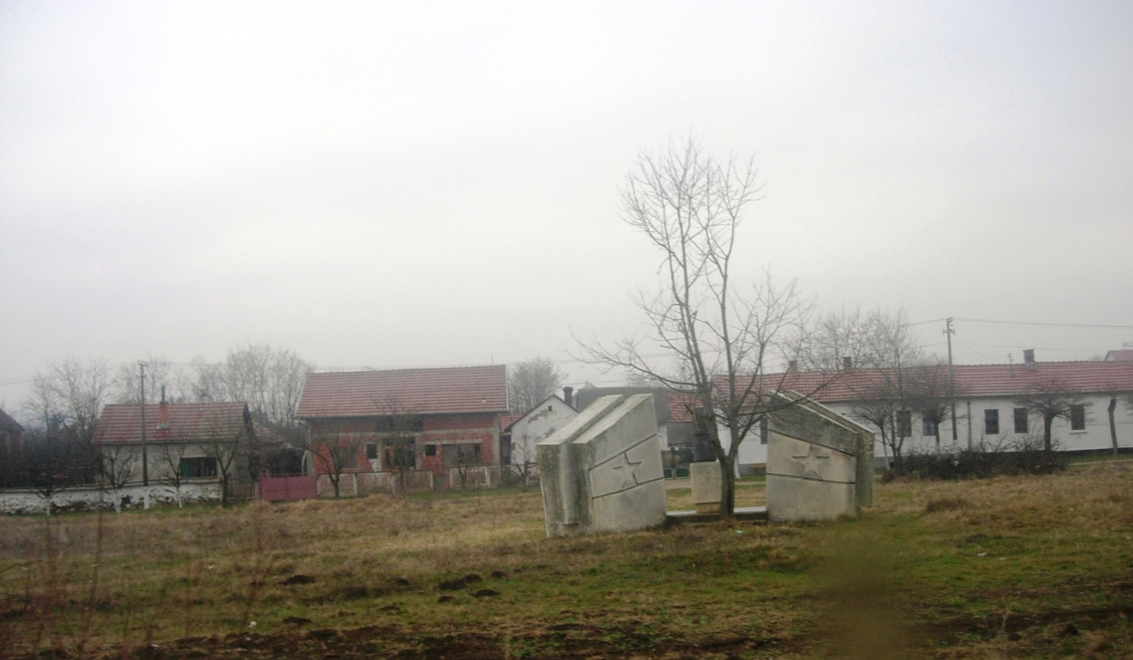 Spomenik u Kosančiću